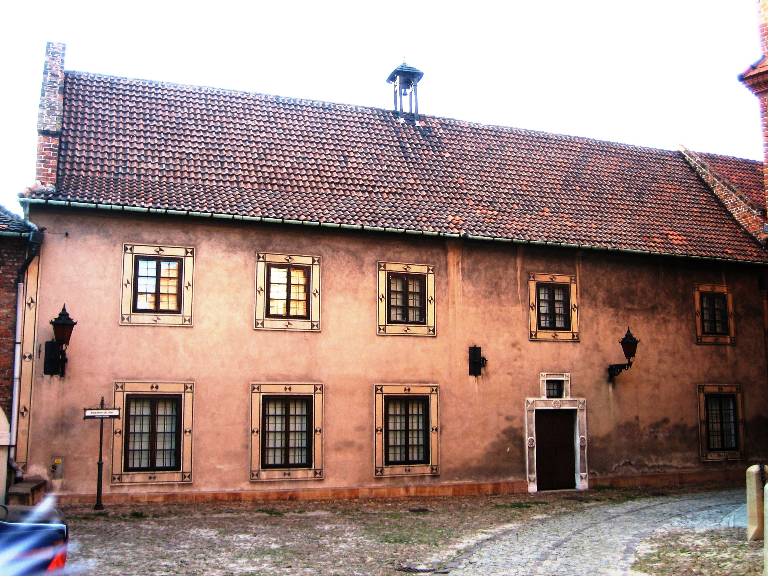 Zespół zabudowy (3 domy)- Scholasteria w Tarnowie, pl Katedralny 5